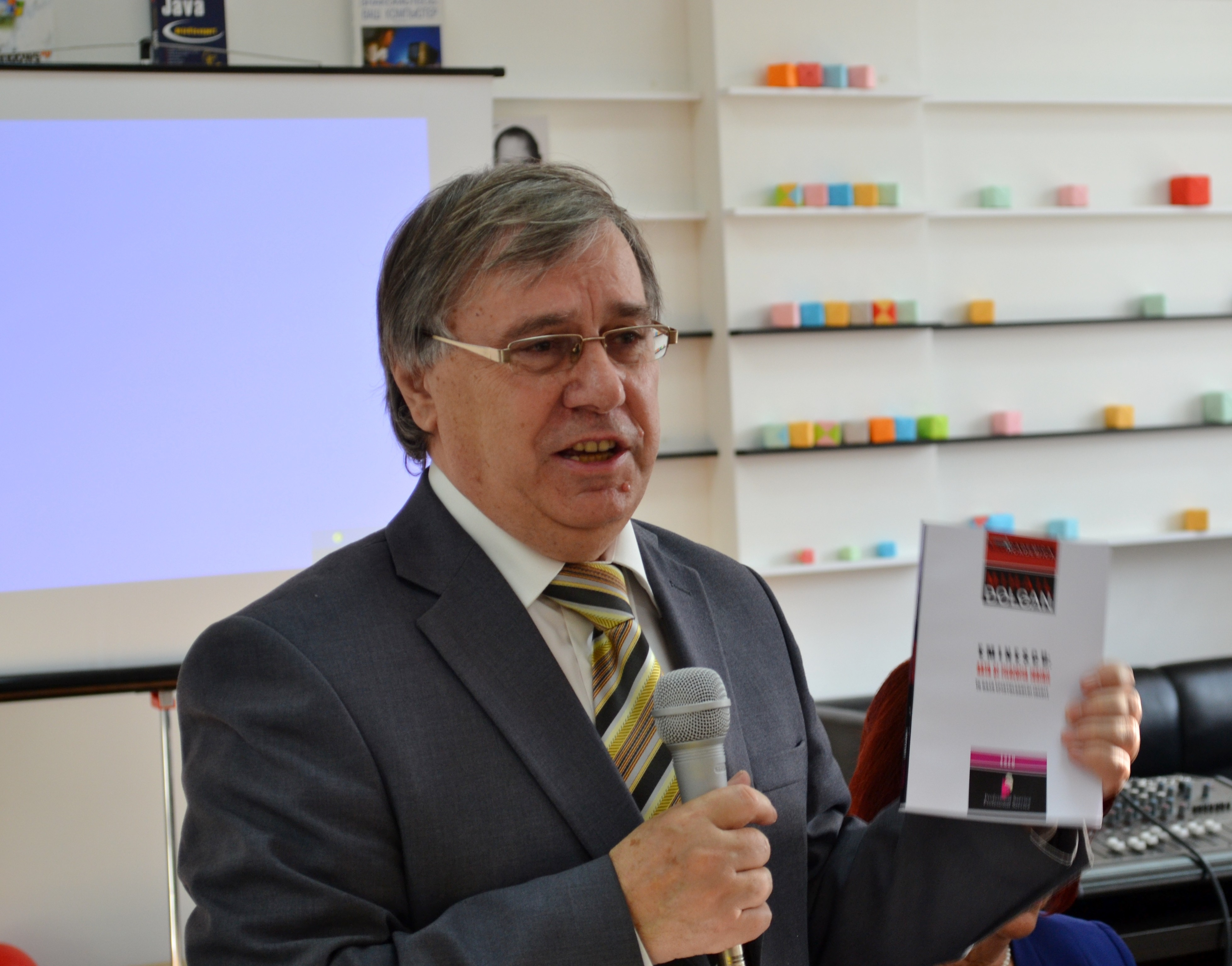 Lansare de carte „Eminescu: arta și filosofia iubirii”, de Mihail Dolgan. Moderator: Nicolae Dabija. Sala de lectură a BC. 06.11.2013.